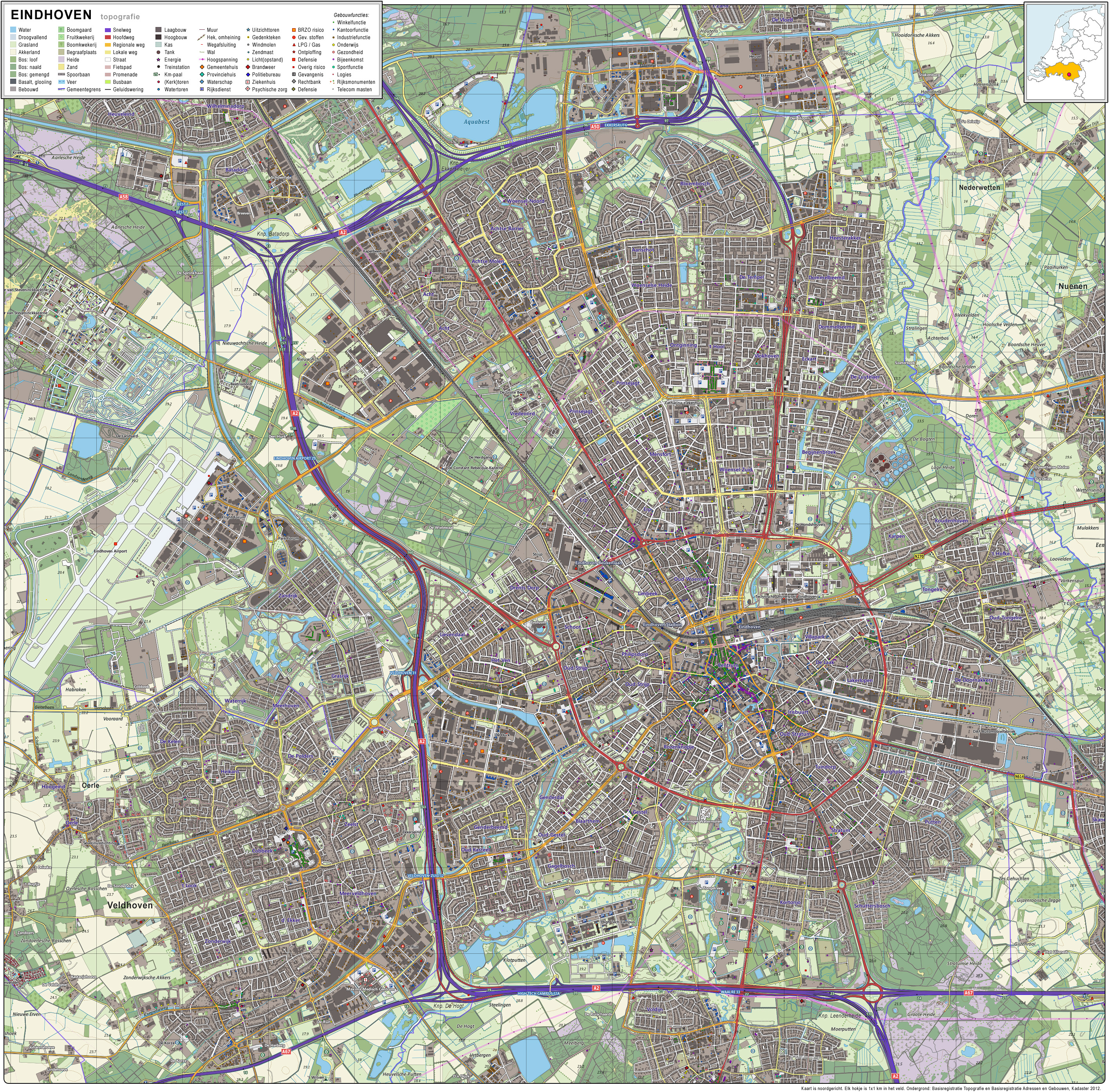 Topografisch beeld van de stad Eindhoven. Op basis van de GML open geodata van de BRT/Top10NL (basisregistratie Topografie, Kadaster 2012), vrijgegeven door Kadaster op 30-11-2012 onder de Creative Commons BY licentie. Gebouwvlakken vanuit Open Geodata BAG extract (december 2012). Samenstelling en kleurenschema: Jan-Willem van Aalst, met QuantumGIS en Photoshop.